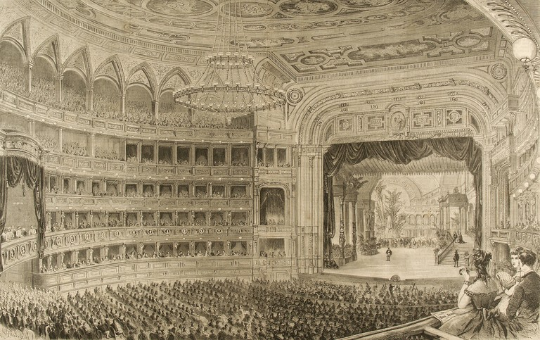 Eröffnungsvorstellung im neuen Haus der Wiener Hofoper mit „Don Giovanni“, Innenansicht mit Blick auf die Bühne, 25. Mai 1869, zeitgenössisches Aquarell. Kunsthistorisches Museum